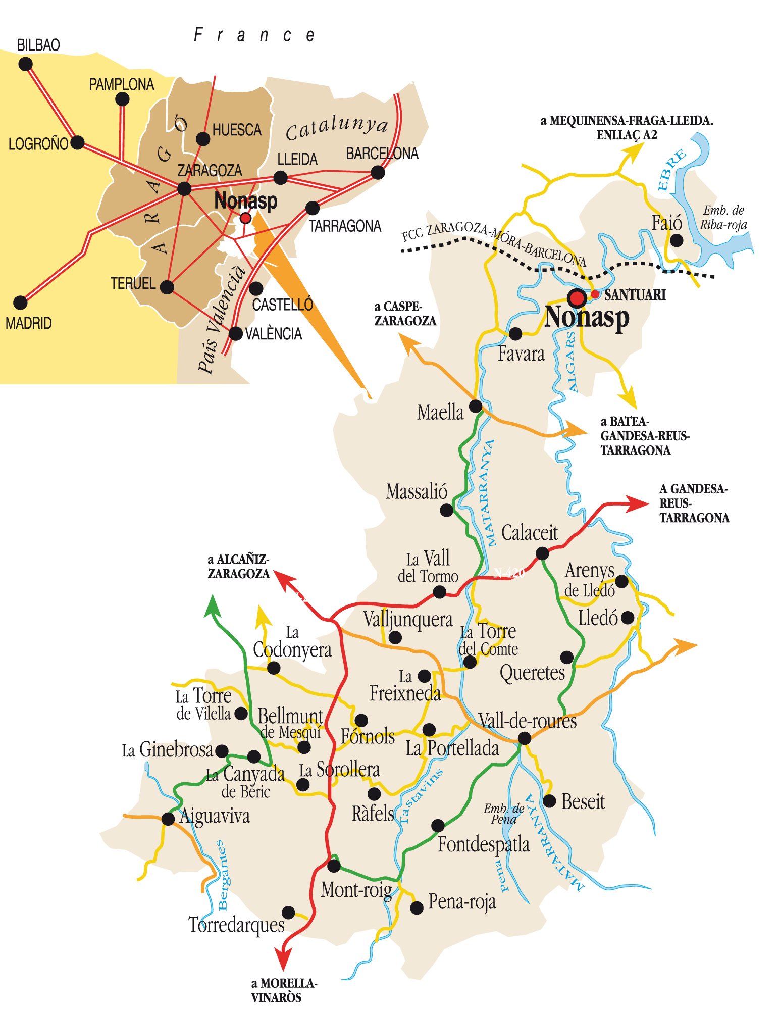 Mapa de la Comarca natural del Matarranya